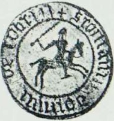 Беларуская (тарашкевіца): Пячатка Рамана Фёдаравіча, князя кобрынскага